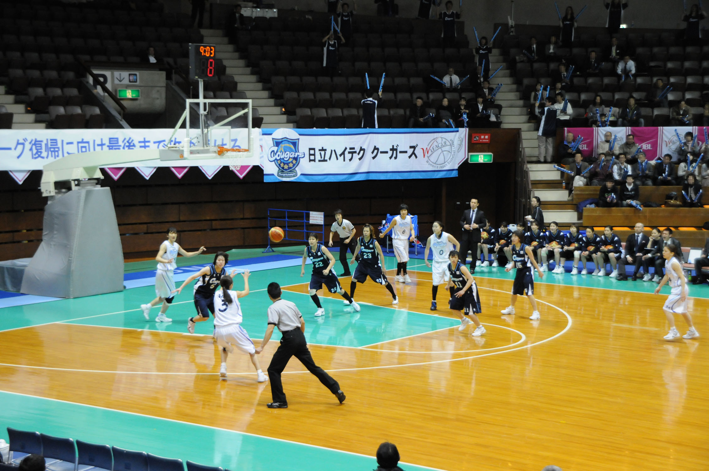 WJBL 09-10入れ替え戦、三菱対日立ハイテク。代々木第二体育館で。